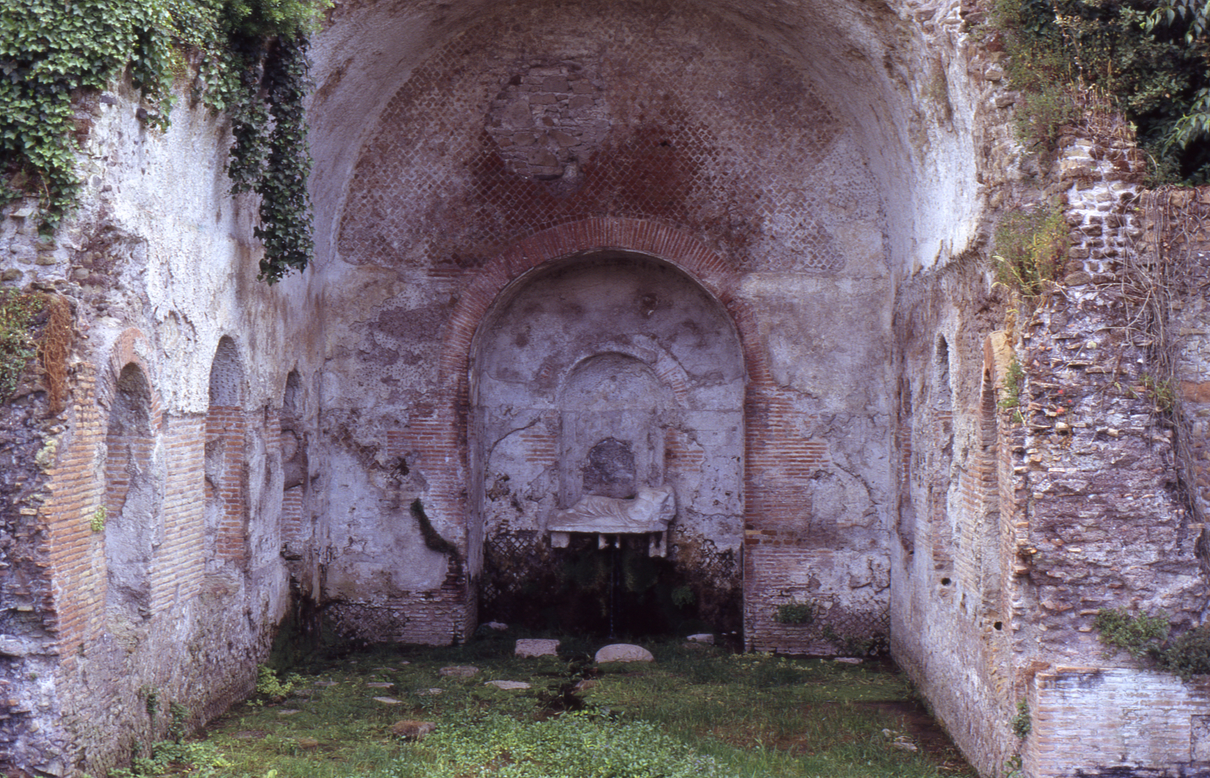 Ninfeo del parco della Caffarella, Roma, Italia